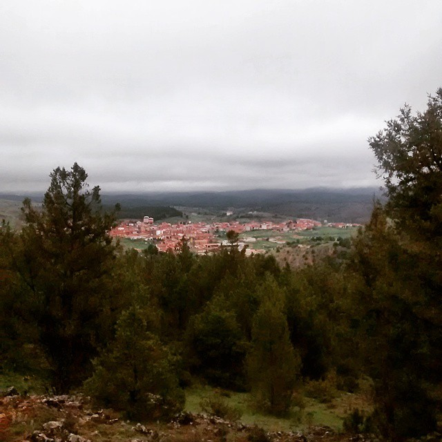 Vista de Hontoria del Pinar, Burgos, España.